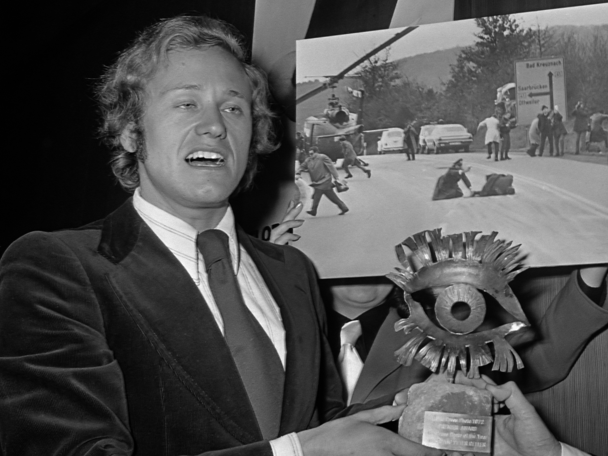 Opening van World Press Photo 1971/1972 op de Floriade te Amsterdam. Minister Schmelzer (r) overhandigt een Gouden Oog aan W. P. Geller (West Duitsland) voor de Persfoto van het jaar 18 april 1972